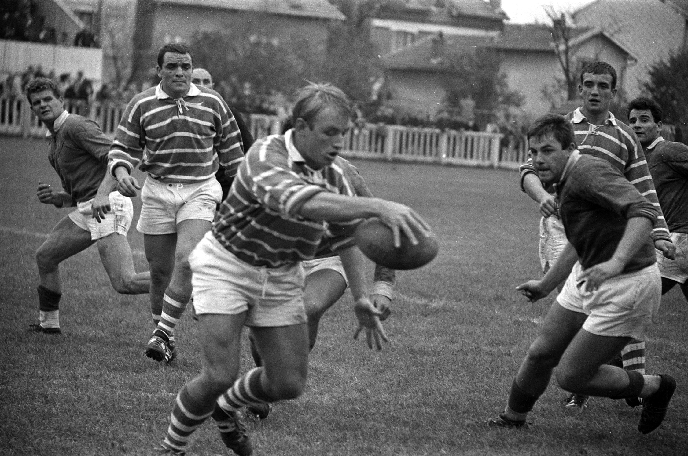 Stade du TOEC. Le 17 Octobre 1965. Vue de Richard Astre lors du match TOEC-Grenoble.